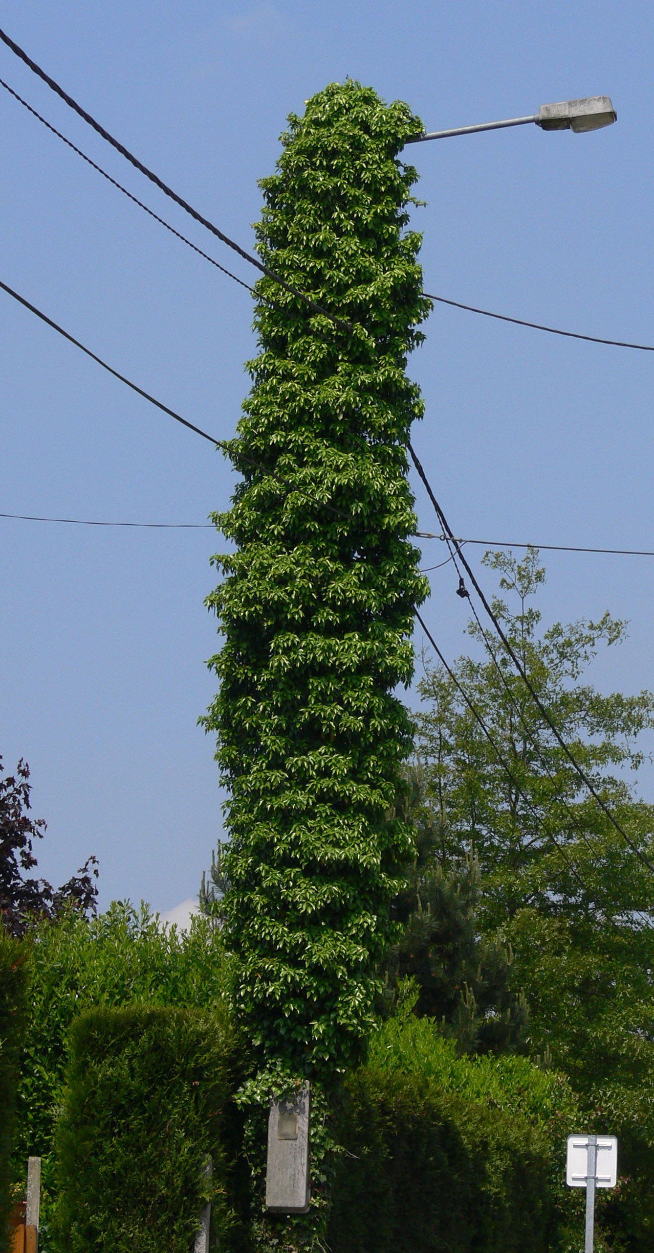 Lierre recouvrant un poteau électrique Lieu : Nord (59), France